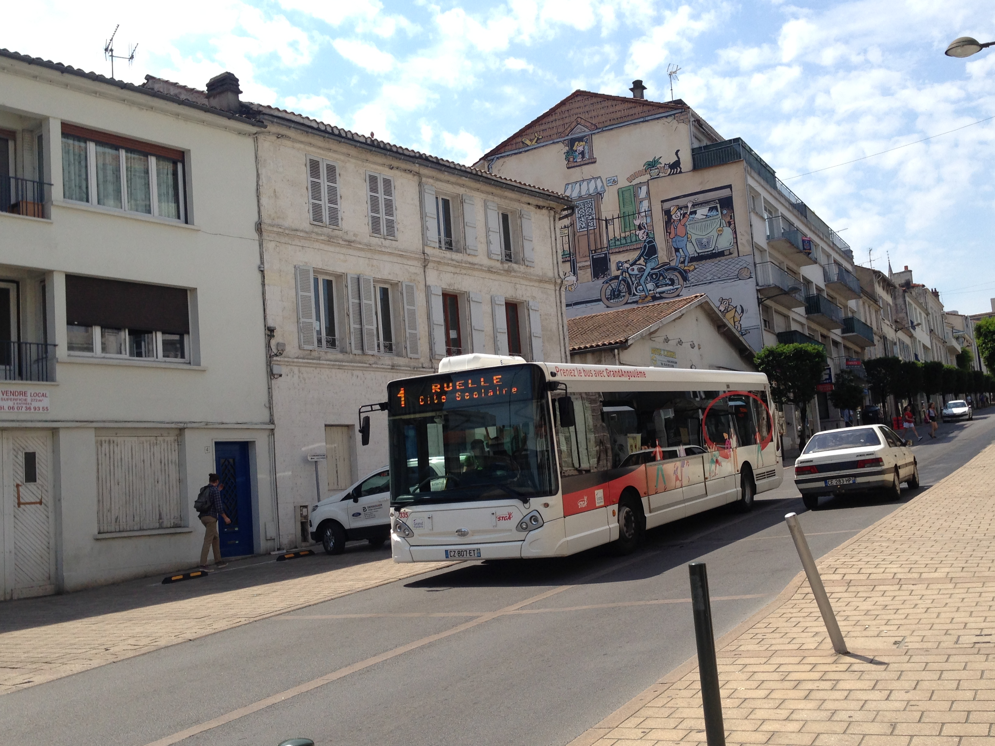 Ligne 1 de STGA